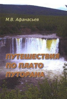 Путешествия по плато Путорана», 2018